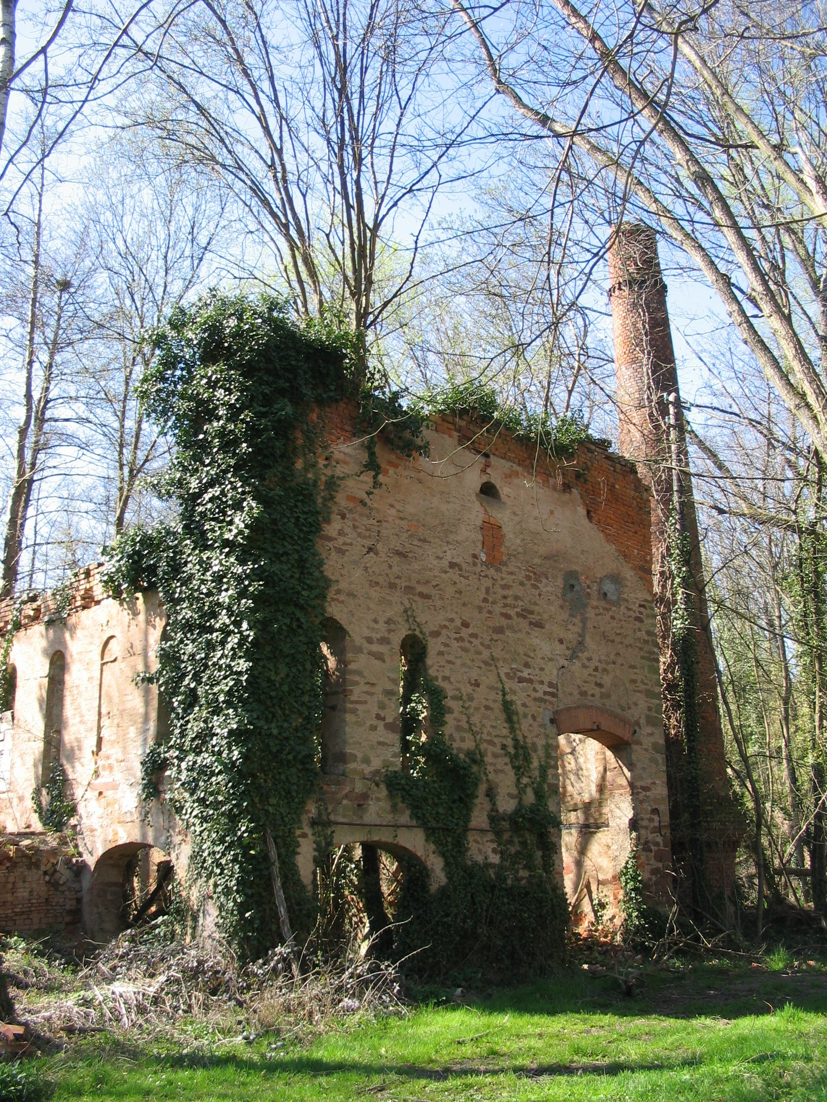 bâtiment de l'ancienne briquetterie Pasquay à Wasselonne (Bas-Rhin) au lieu-dit la Papeterie.